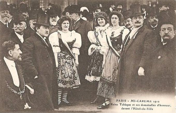 La Reine tchèque Ruzena Brazova encadrée par ses deux demoiselles d'honneur, les sœurs Vanek, devant l'Hôtel de Ville de Paris au moment des fêtes de la Mi-Carême.